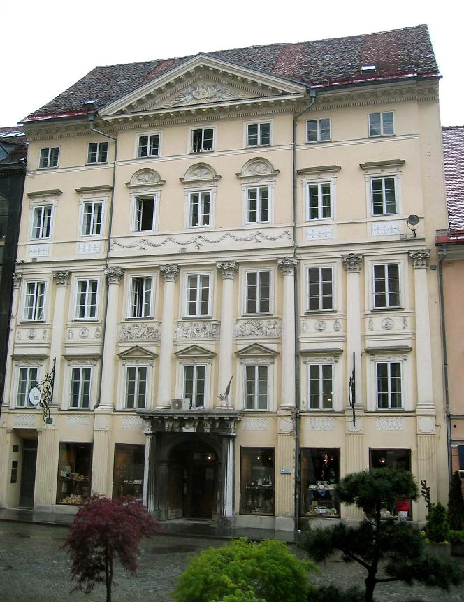 Souvan House, Ljubljana photo:Ziga 14:26, 1 May 2006 (UTC)